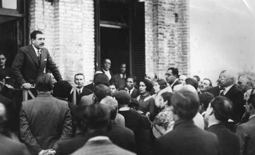 Moises Lebensohn discurso